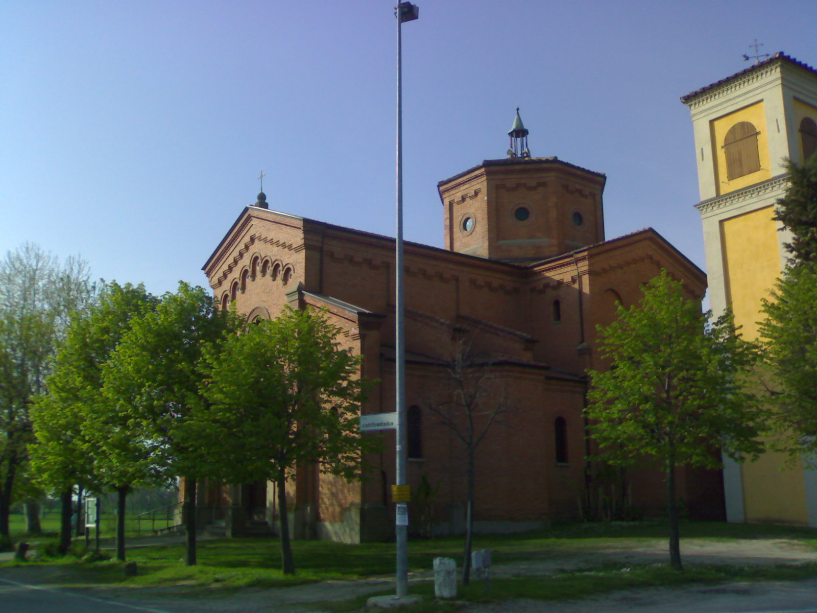 La chiesa di Marano di Castenaso, dedicata a San Giminiano